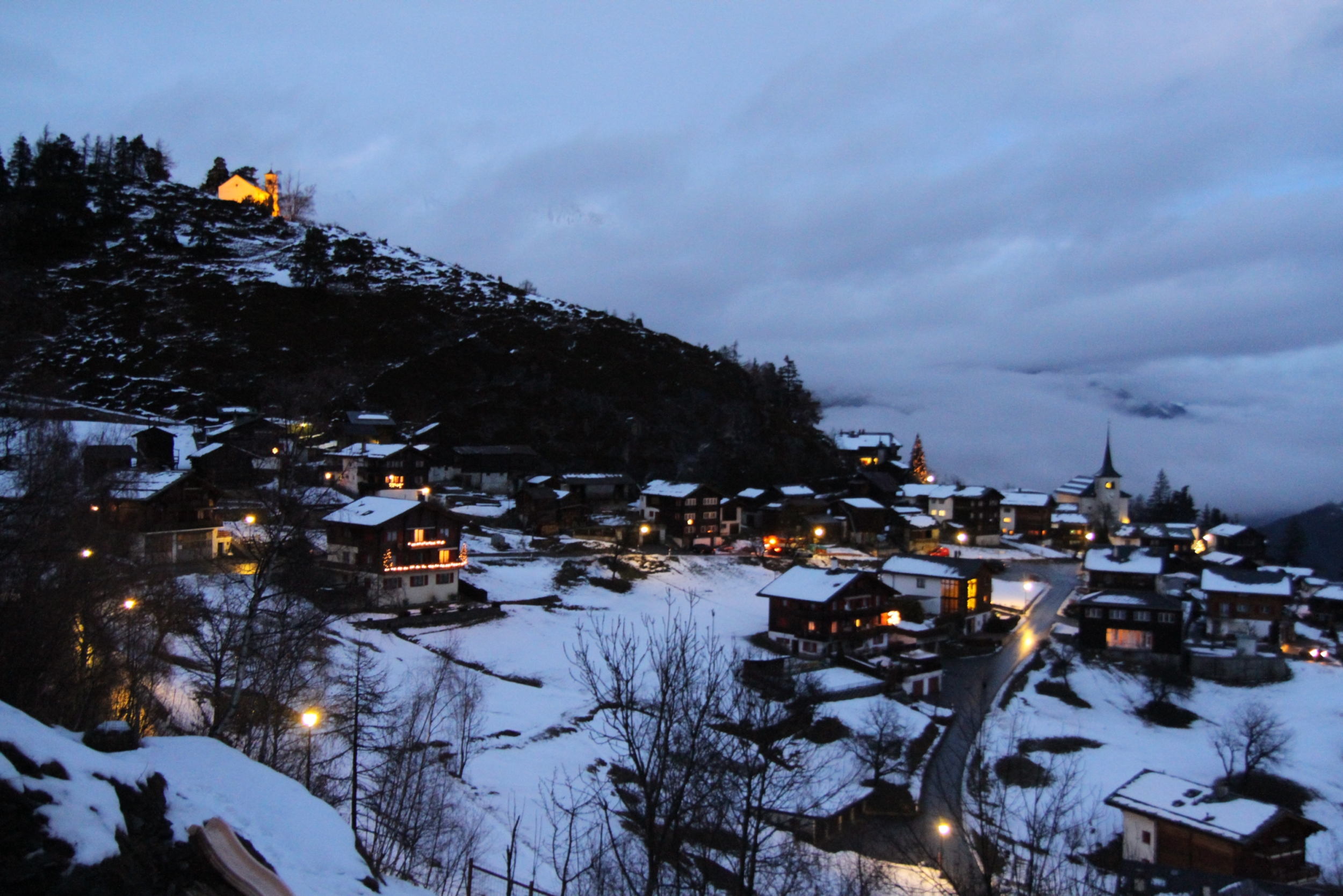 Bergdorf Zeneggen im Wallis